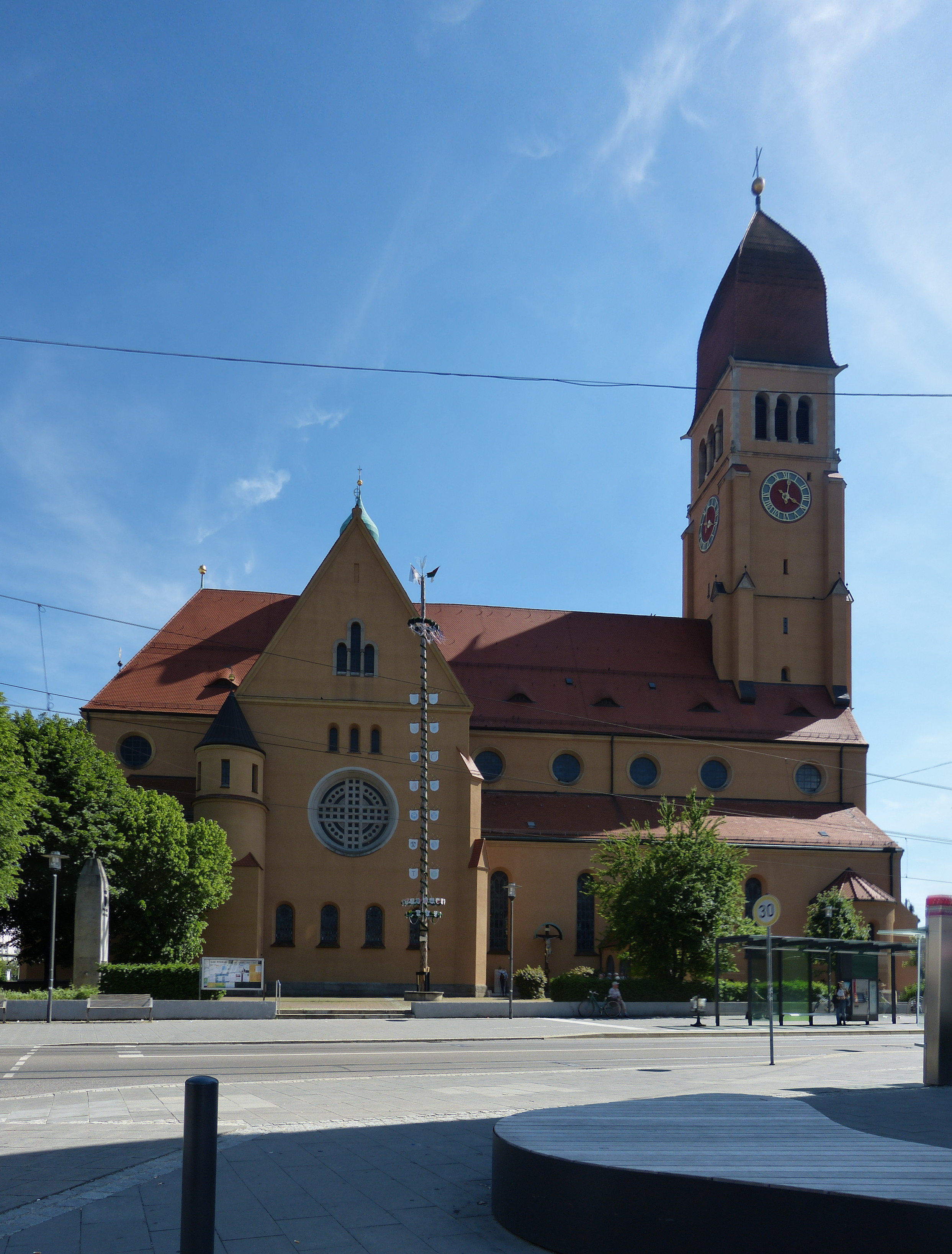 Die Herz-Jesu-Kirche in Augsburg This is a photograph of an architectural monument.